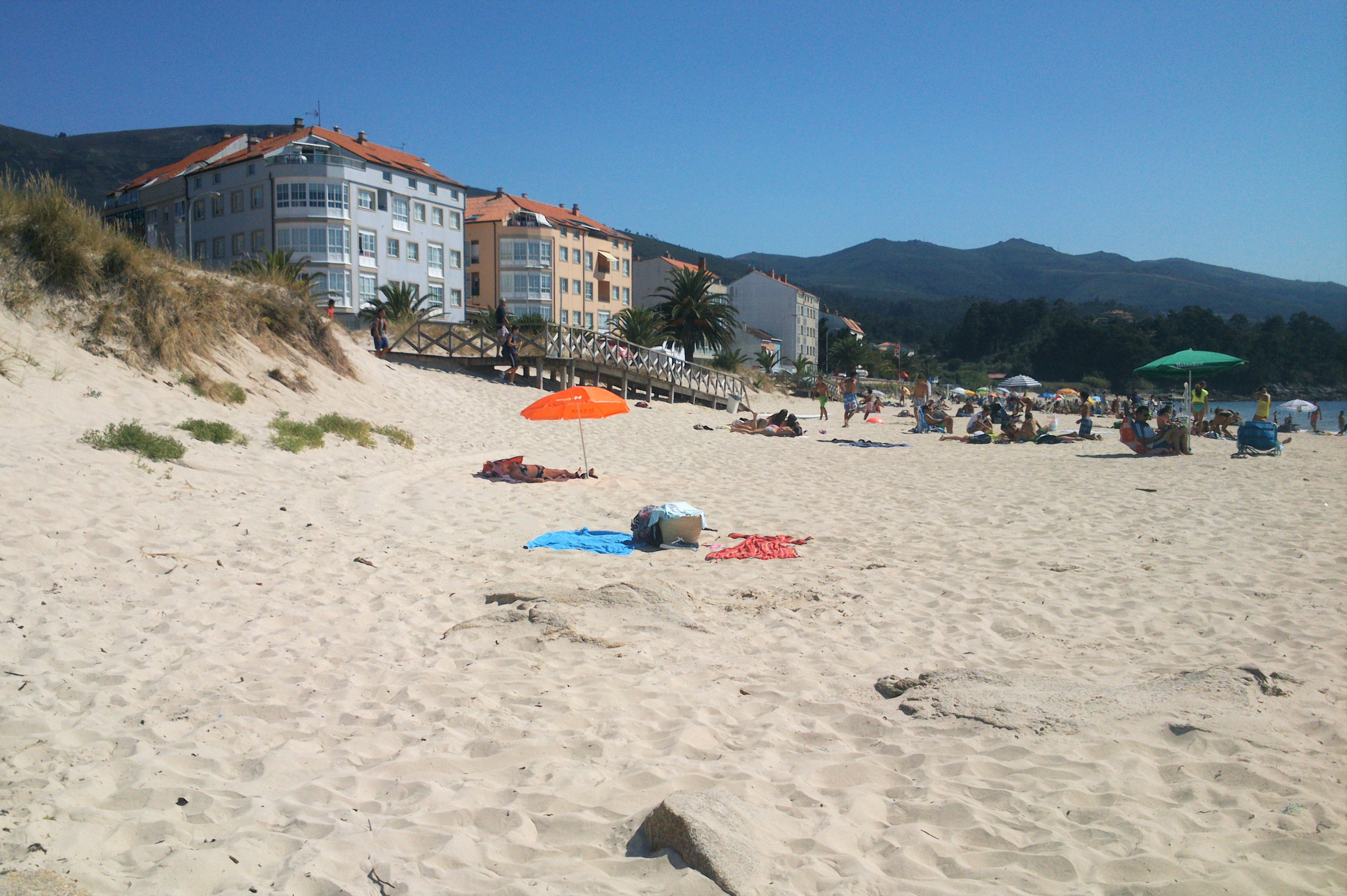 Praia de Portosín, Porto do Son.